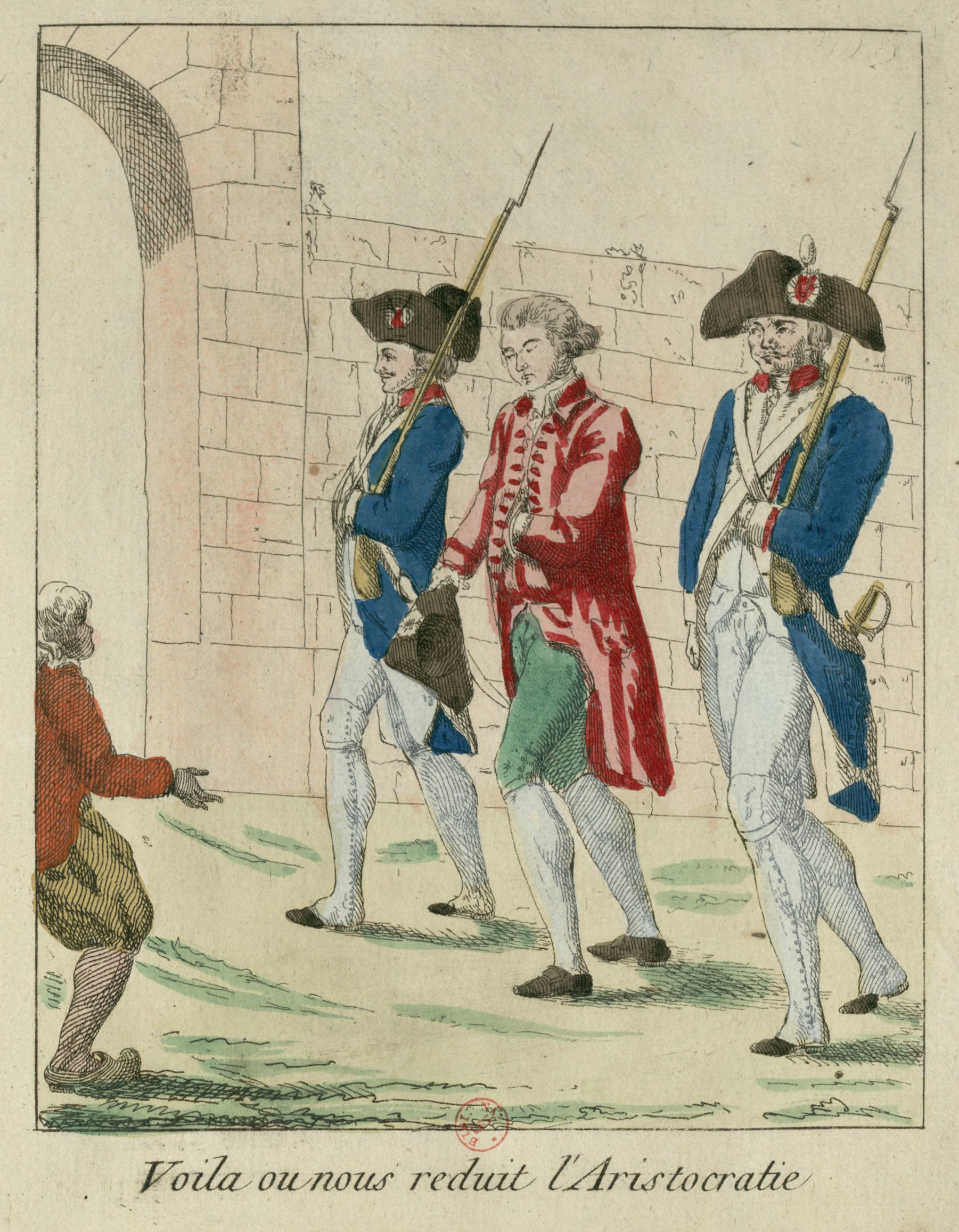 "Voilà où nous réduit l’Aristocratie." Pierre-Auguste Caron de Beaumarchais, nu-tête, la main gauche passée dans l’habit, la droite tenant le chapeau, entre deux gardes françaises qui le conduisent à Saint-Lazare. Gravure à l’eau-forte coloriée, 17,6 x 14,2 cm. Bibliothèque nationale de France.